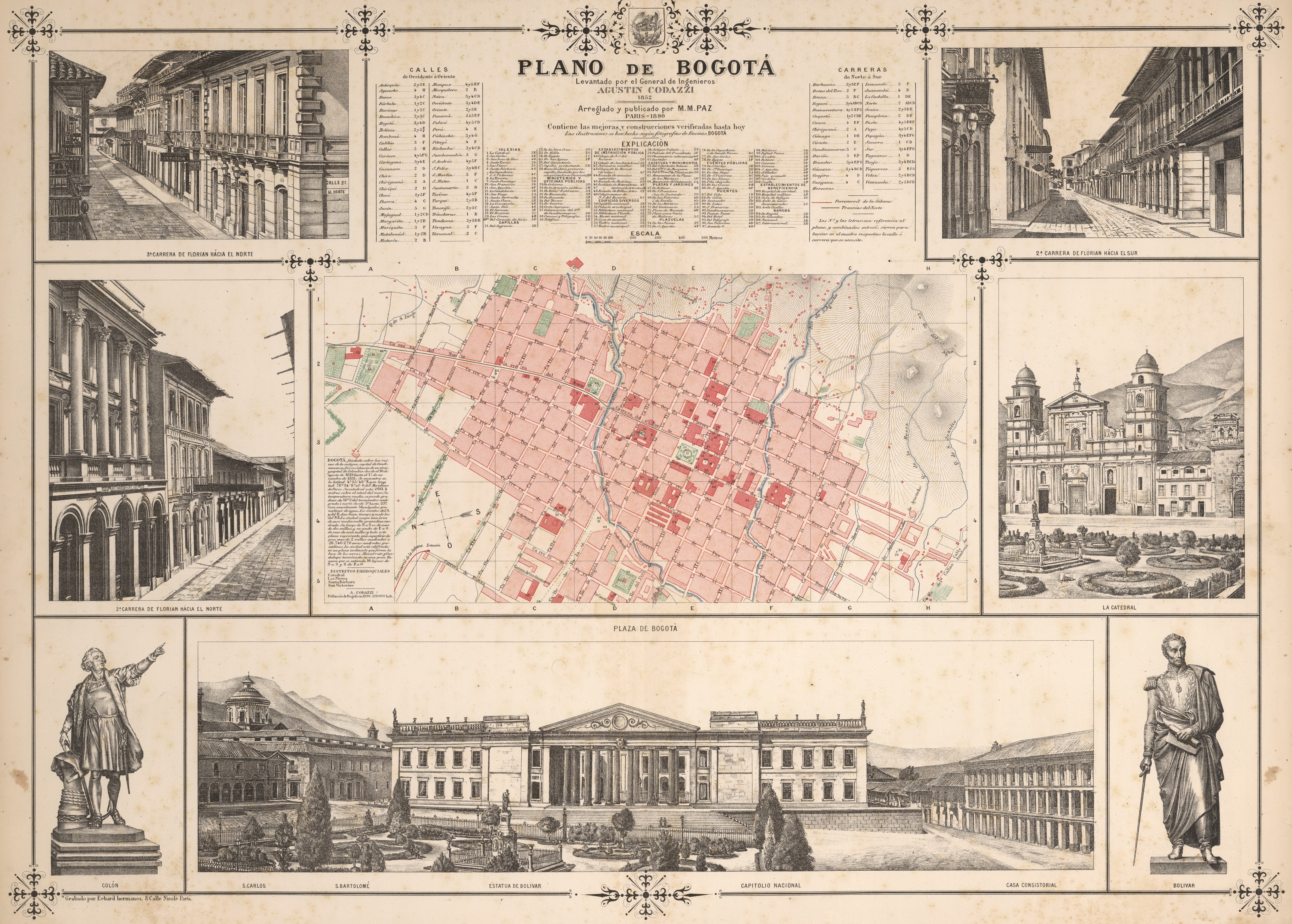 Plano de Bogotá del Atlas geográfico e histórico de la República de Colombia, 1890. Carta XX del Atlas geográfico e histórico de la República de Colombia, 1890.